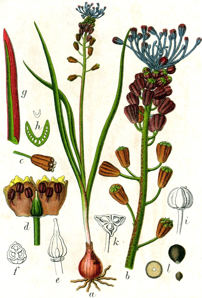 Leopoldia comosa (L.) Parl., syn. Muscari comosum (L.) Mill. Original Caption Gemeine Schopfhyazinthe, Muscari comosum